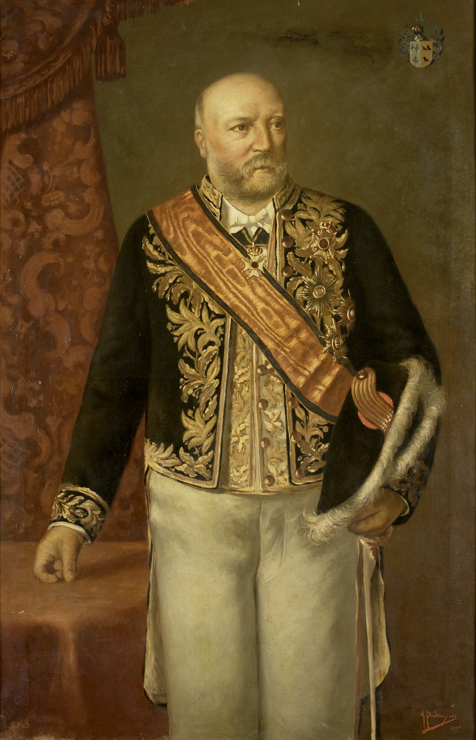 Portret van Cornelis Pijnacker Hordijk (1847-1908). Gouverneur-generaal (1888-93). Kniestuk, staande, iets naar rechts gekeerd. De rechterhand rustend op een tafel, de steek in de linkerhand. Rechtsboven het familiewapen. Onderdeel van een reeks van portretten van de gouverneurs-generaal van het voormalige Nederlands Oost-Indië. Collection: schilderijen; Gouverneurs-generaal serie